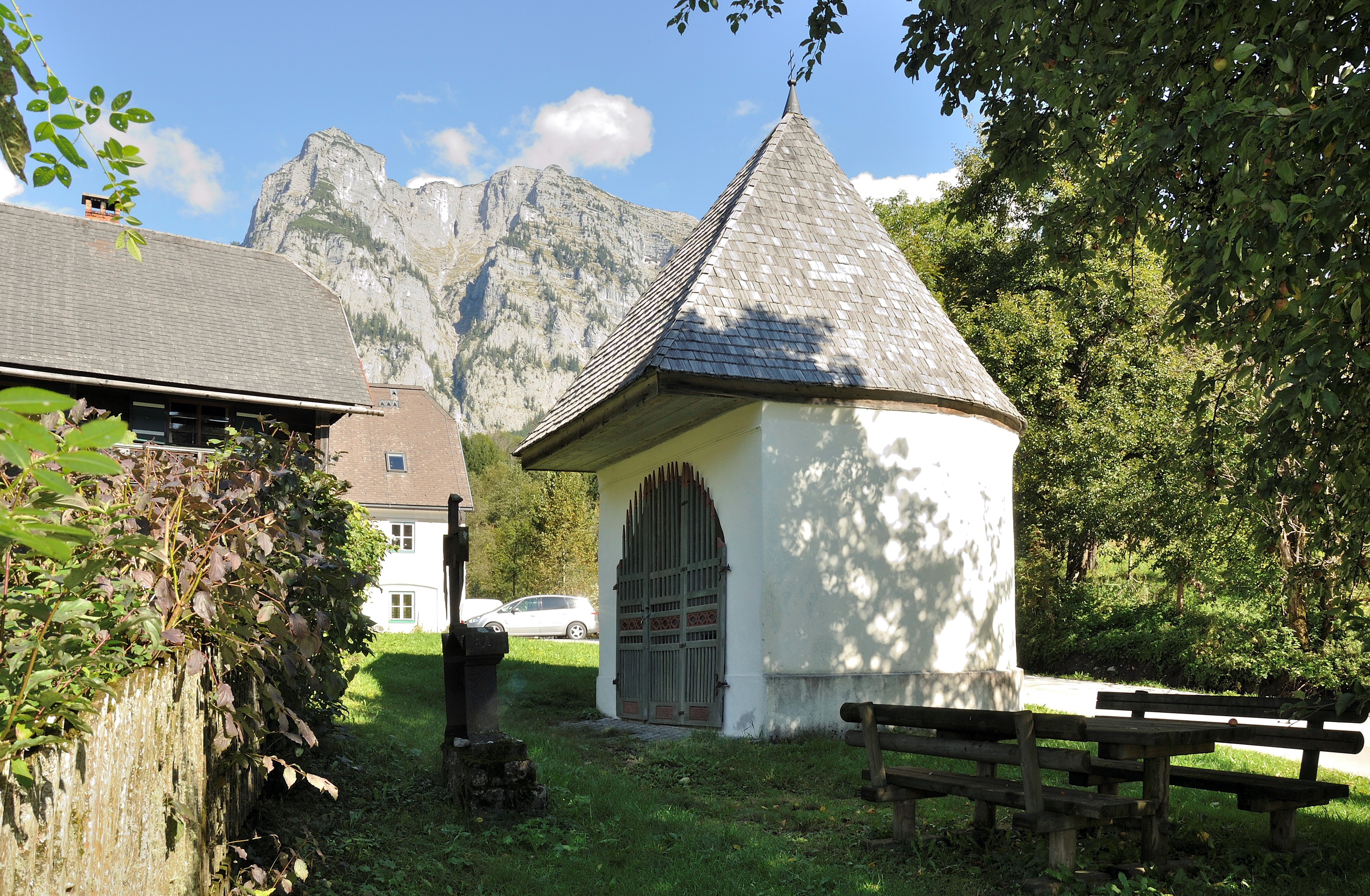 Hofkapelle und Grabdenkmal, dahinter der 1962 Meter hohe Kosennspitz